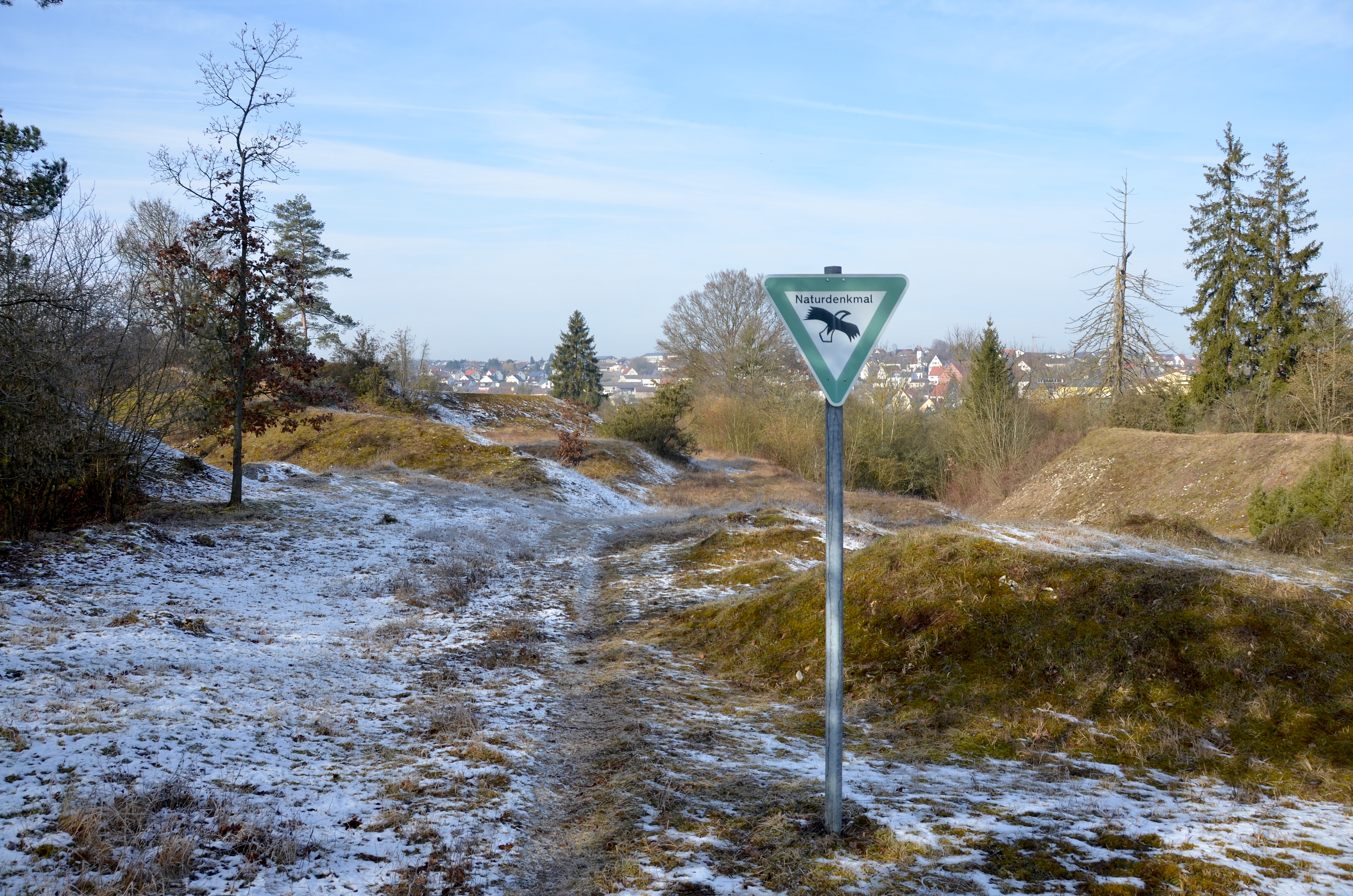 Geotop in den Gewannen Augstletweg, Blattegert und Steigäcker bei Mähringen (Ulm)